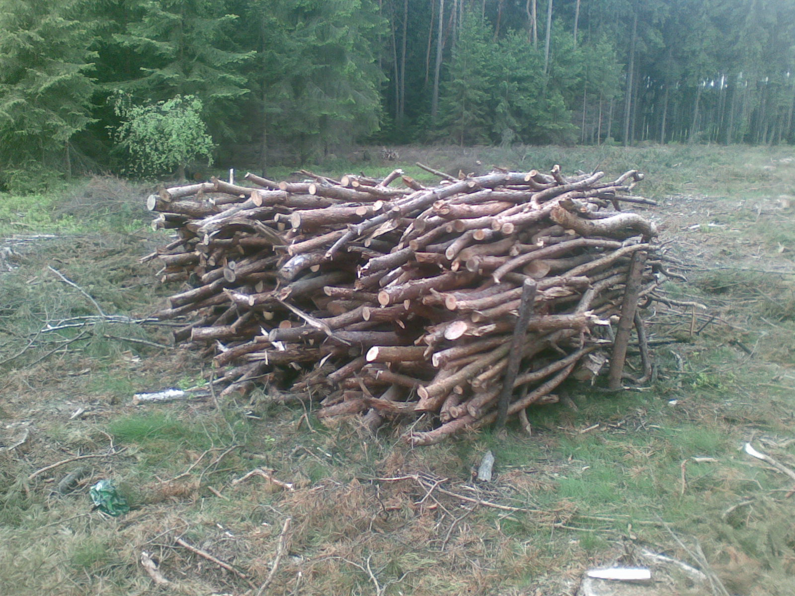 Drobne drewno opałowe